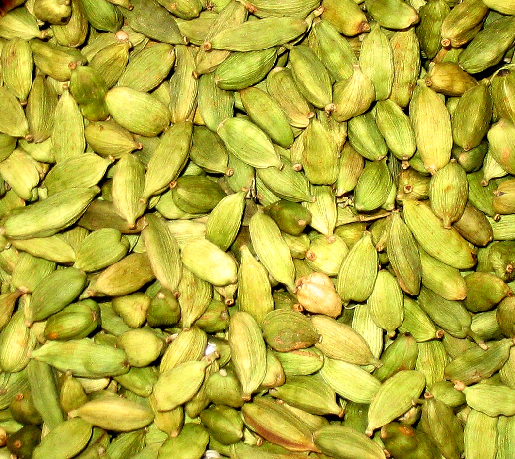 Cardamom pods.